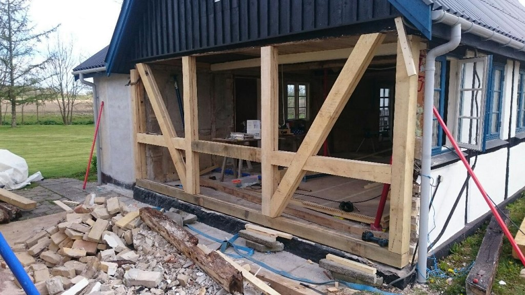 Billede af igangværende konstruktion af bindingsværk